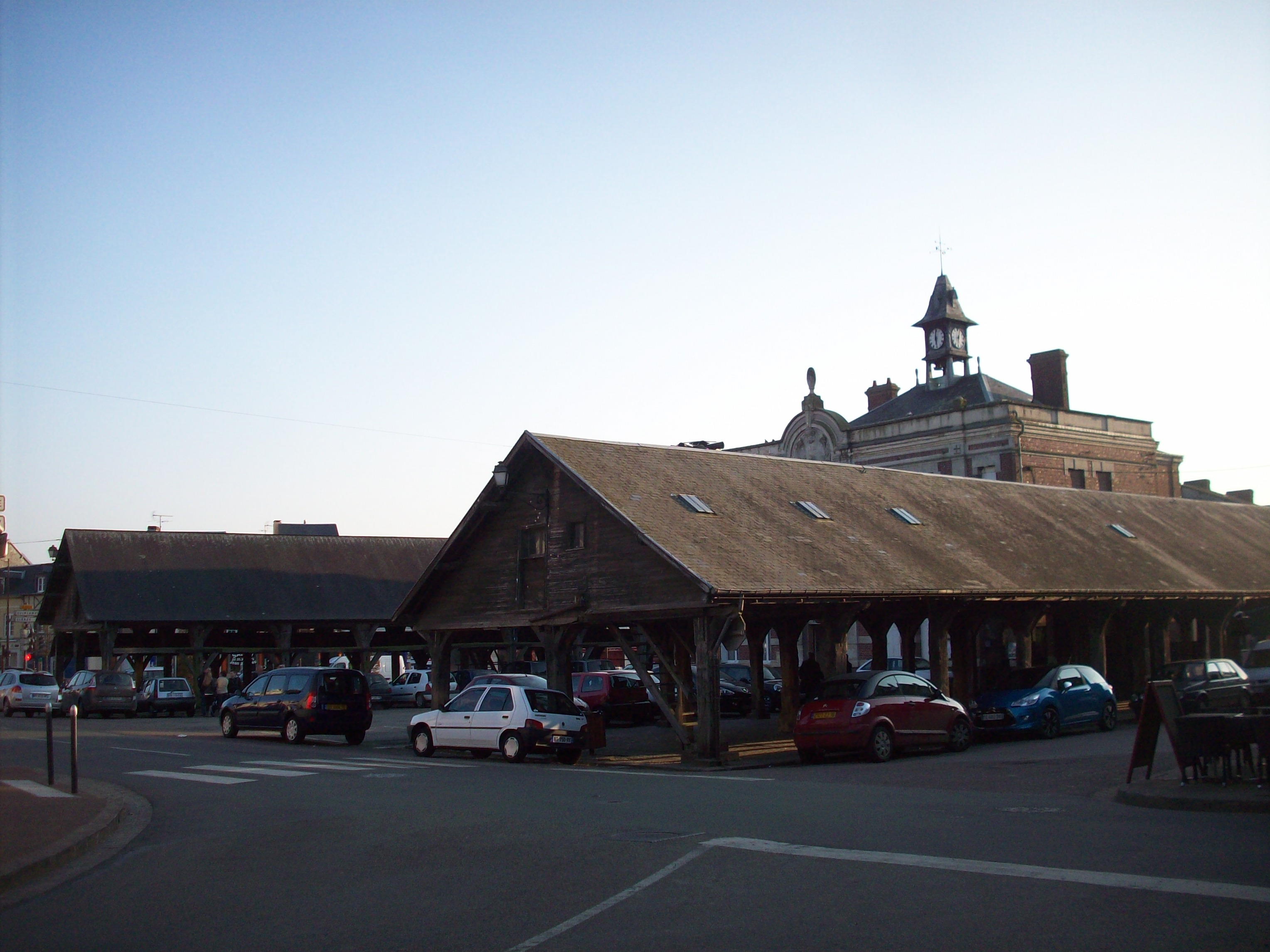 Mairie et halle de Buchy.